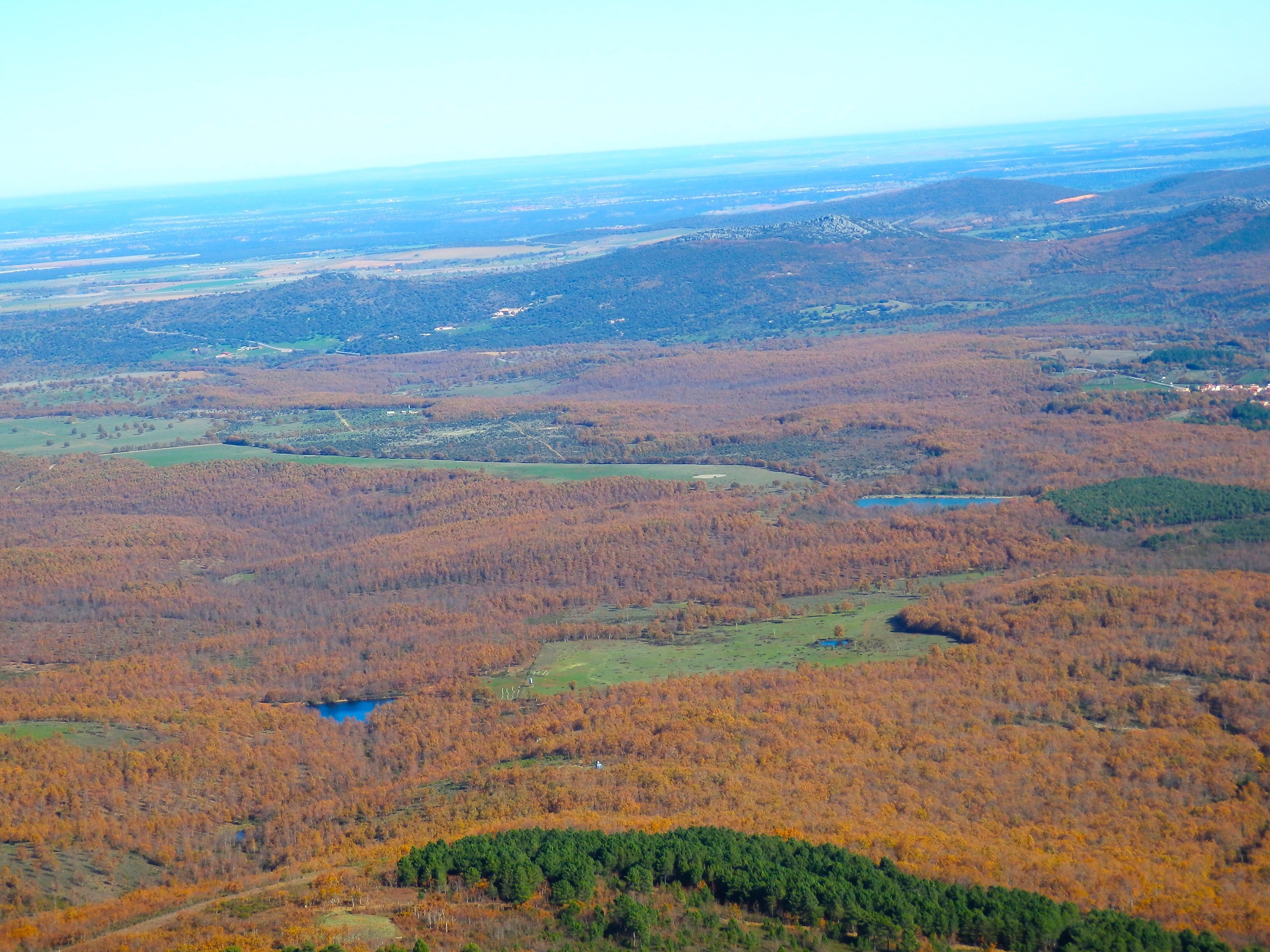 Imagen otoñal desde la Peña de Francia. A la derecha se ve el pueblo de El Cabaco.